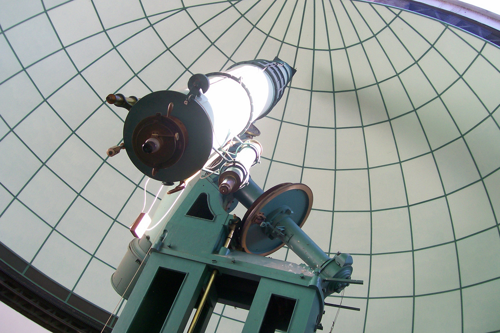 Telescopio del Museo de Astronomía y Geofísica